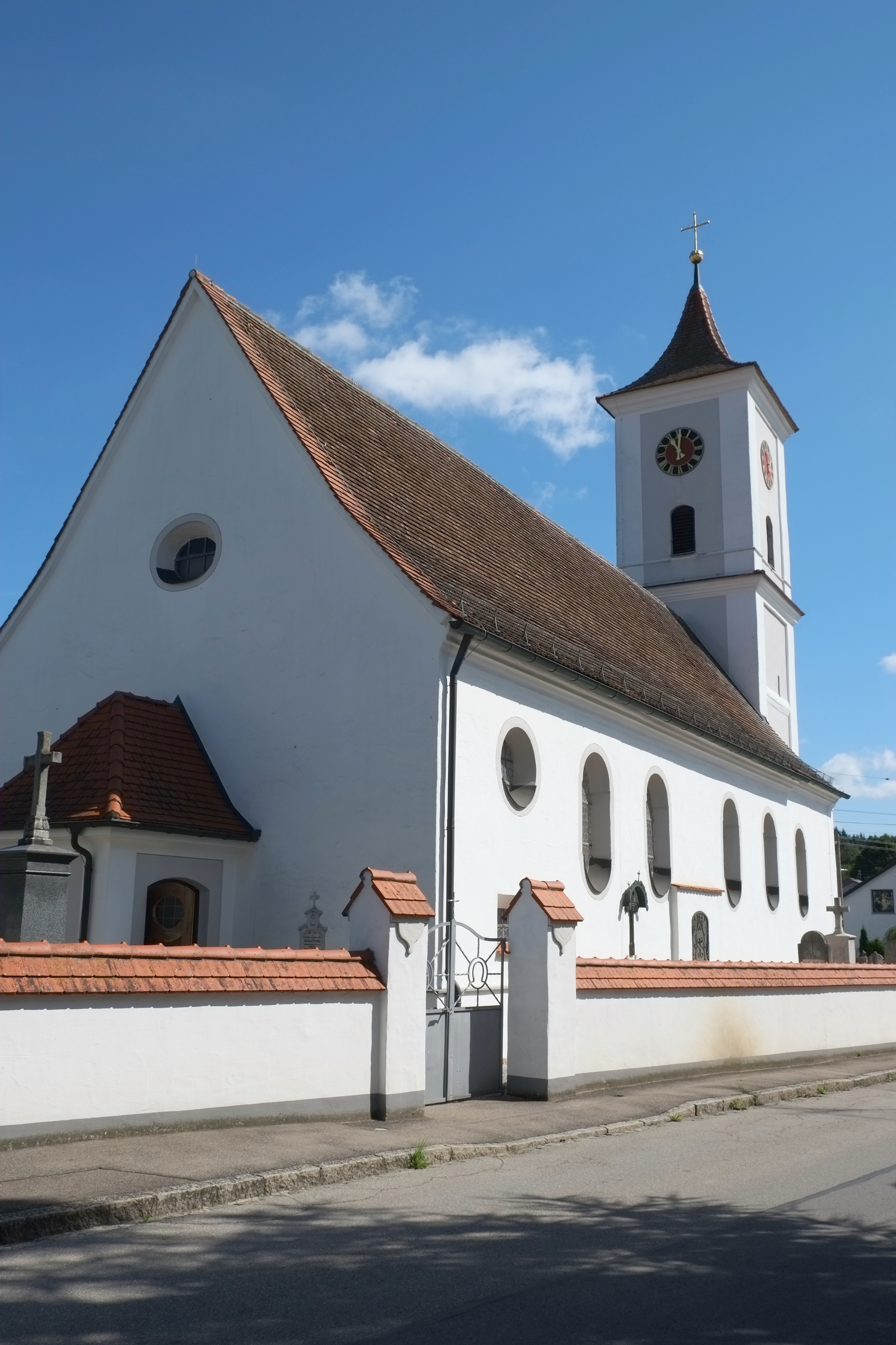 Kirche St. Stephan in Gallenbach, einem Stadtteil von Aichach im Landkreis Aichach-Friedberg (Bayern, Deutschland)